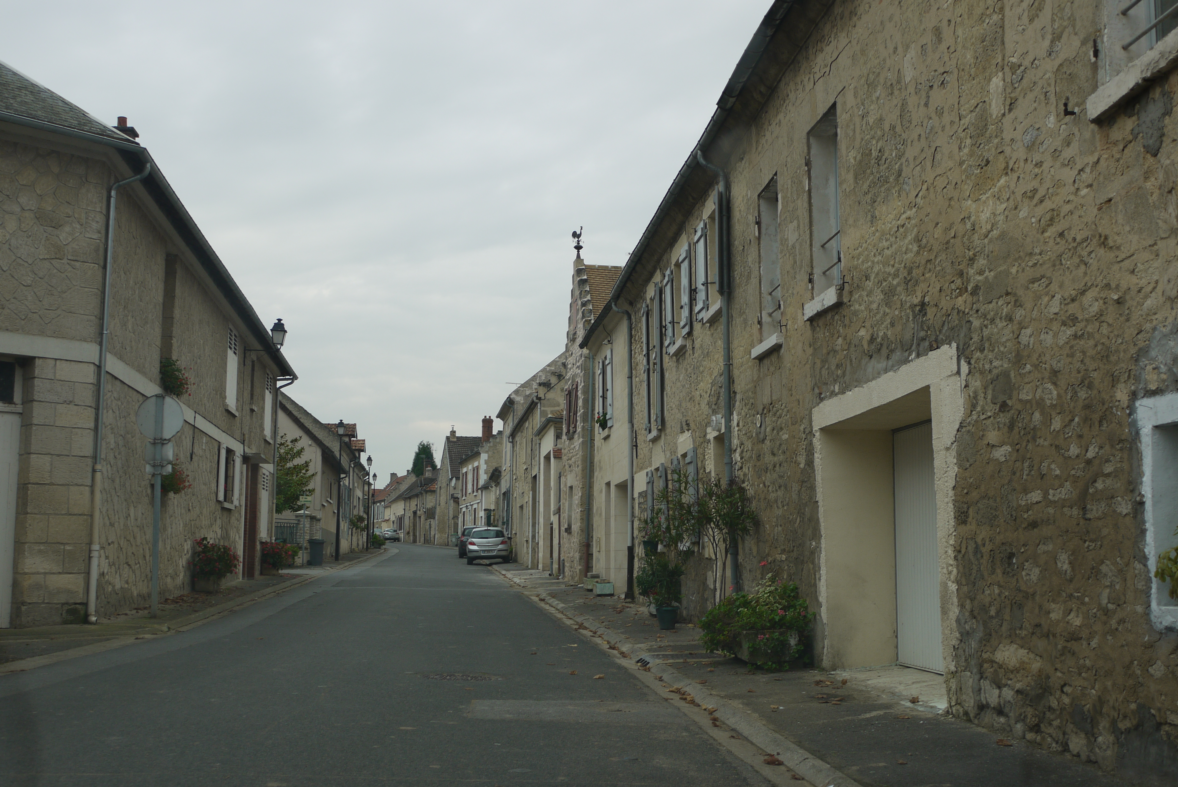 Rue Principale de Limé (Aisne)